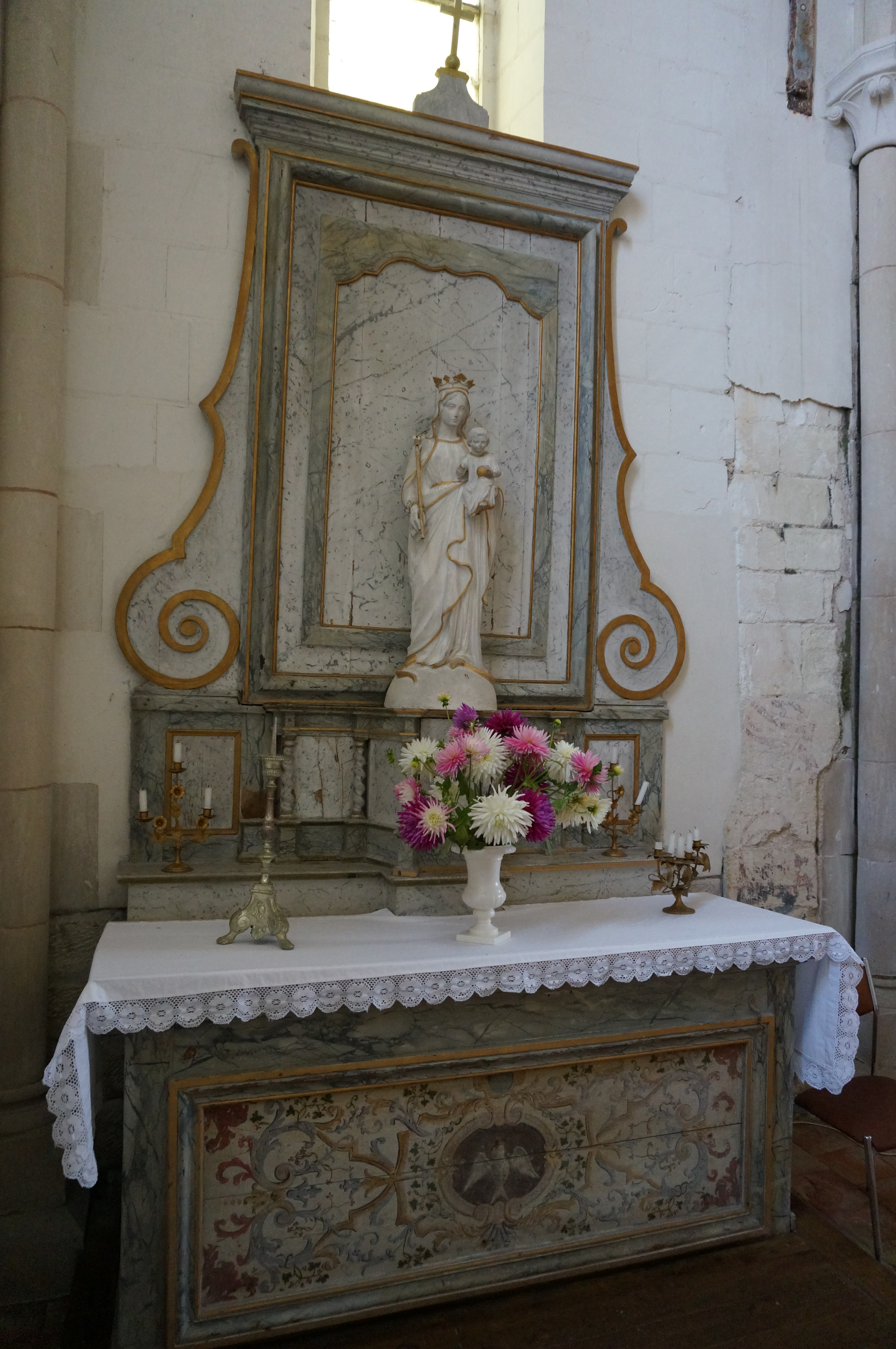 à Breuvery-sur-Coole.